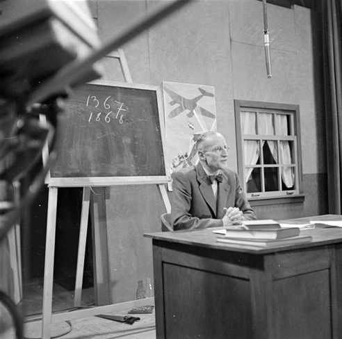 Johan Bodegraven in het NCRV-spelletje Ziet u er iets in?